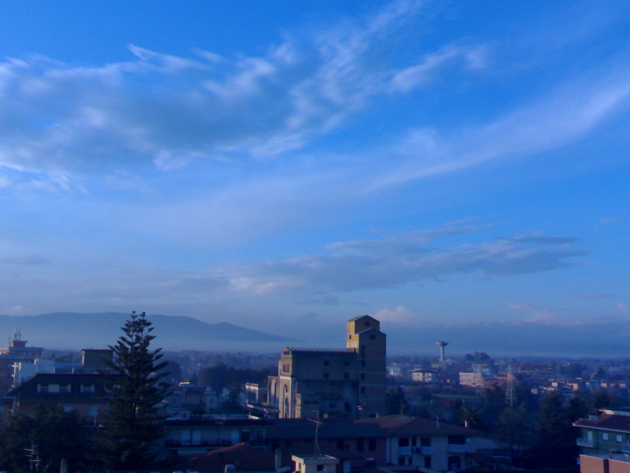 Foto di Cisterna di Latina